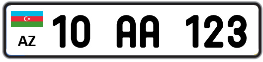 Azərbaycan Respublikası avtomobil dövlət qeydiyyat nişanı - Ali RəHbərlik